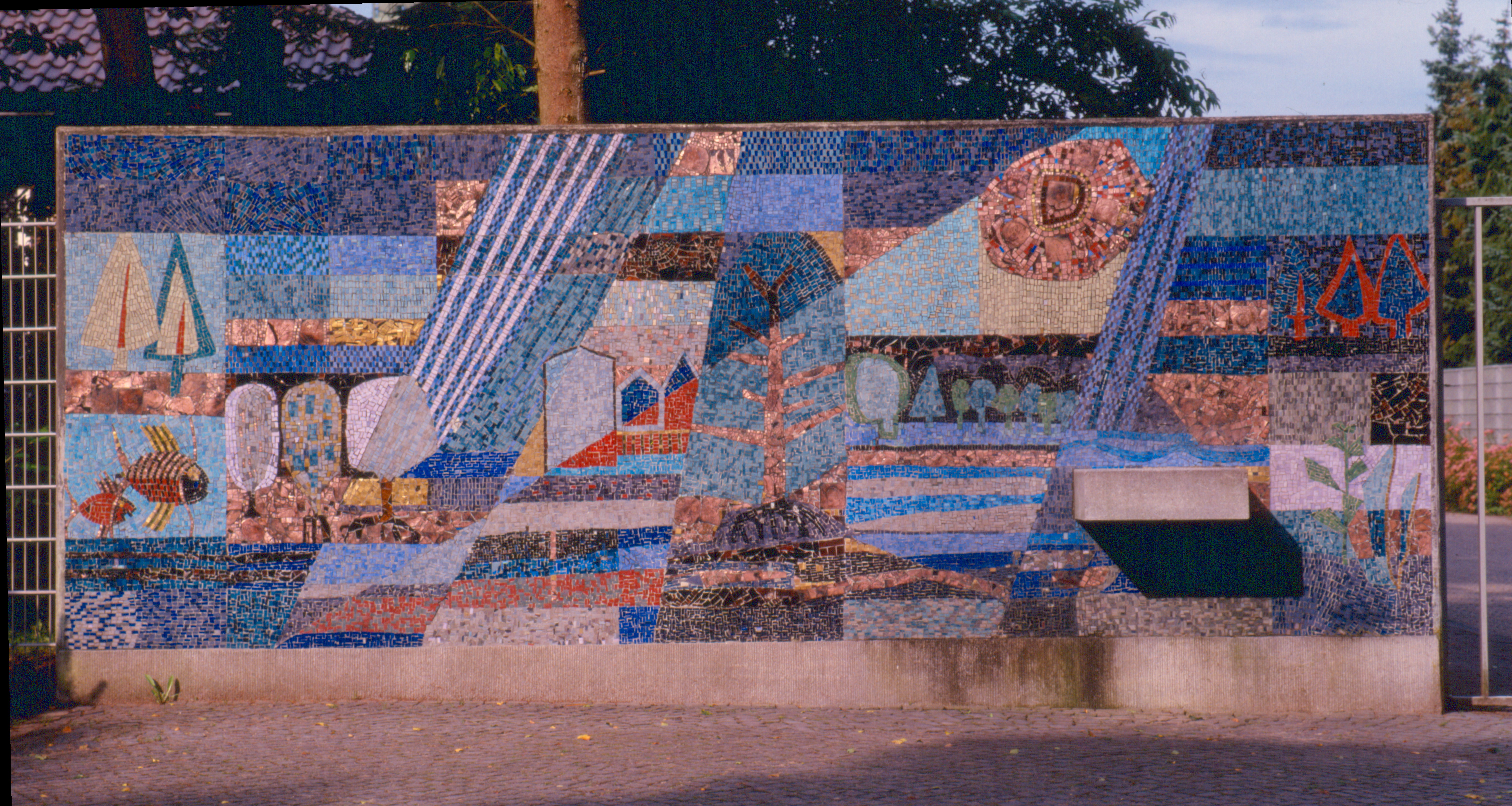 Georg Schmidt-Westerstede: Glasmosaik "Kreislauf des Wassers" am Wasserwerk der Stadt Oldenburg, Hatten-Sandkrug. Wv-Nr. 2139, 1962